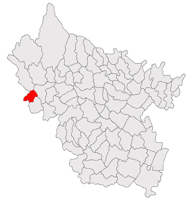 Categorie:Hărţi ale judeţului Buzău